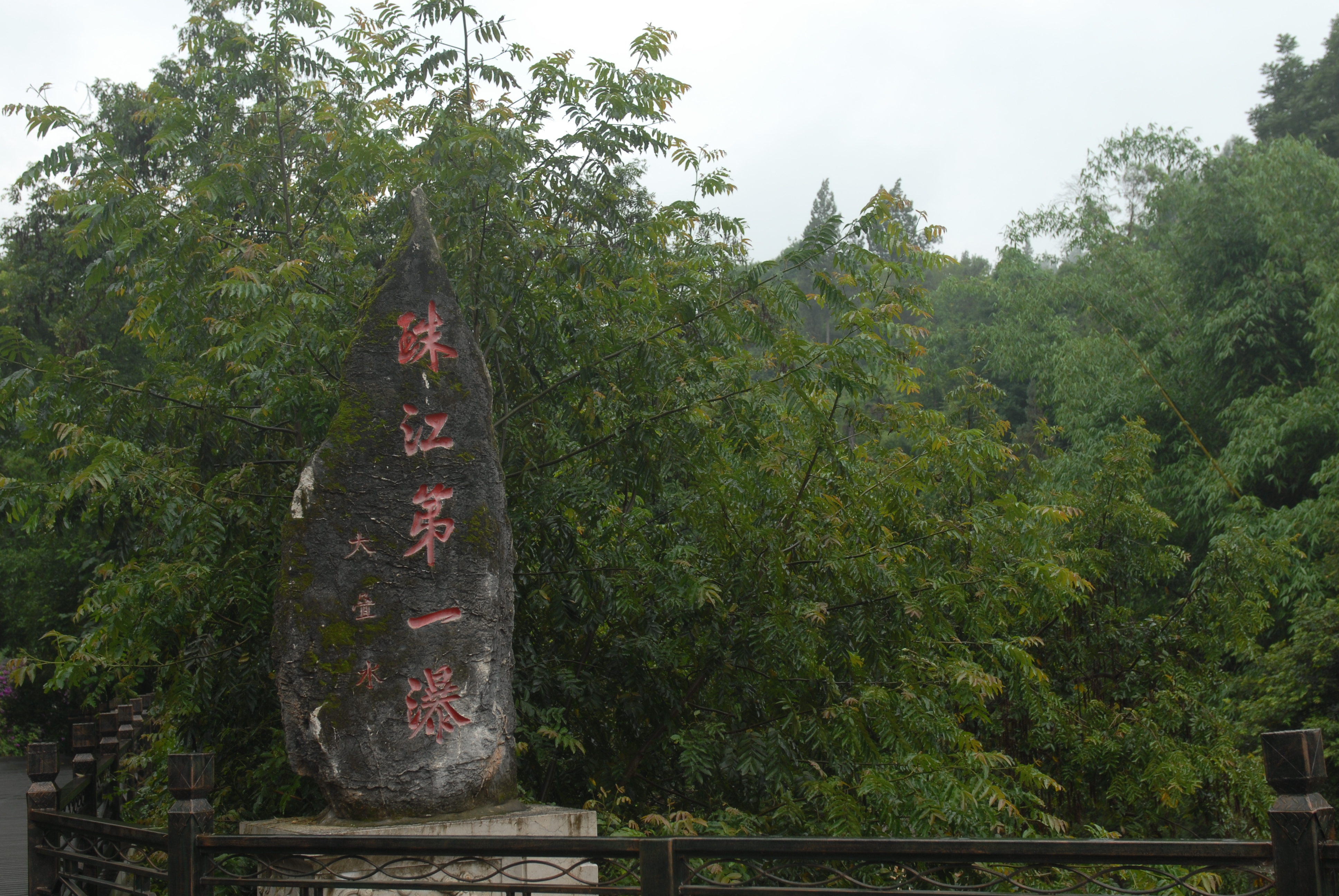 中文（中国大陆）: 云南石林大叠水瀑布，“珠江第一瀑”